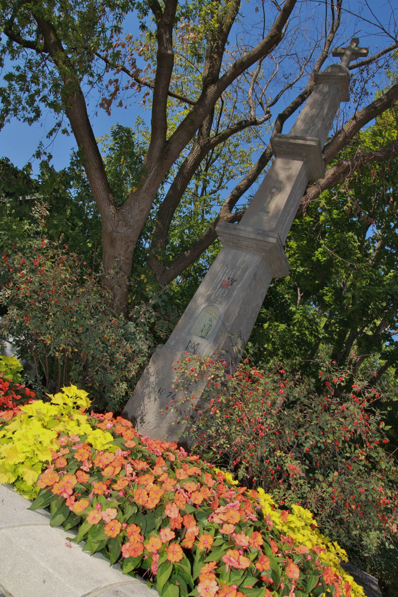 Croix de chemin en pierre du Haut-du-Sault